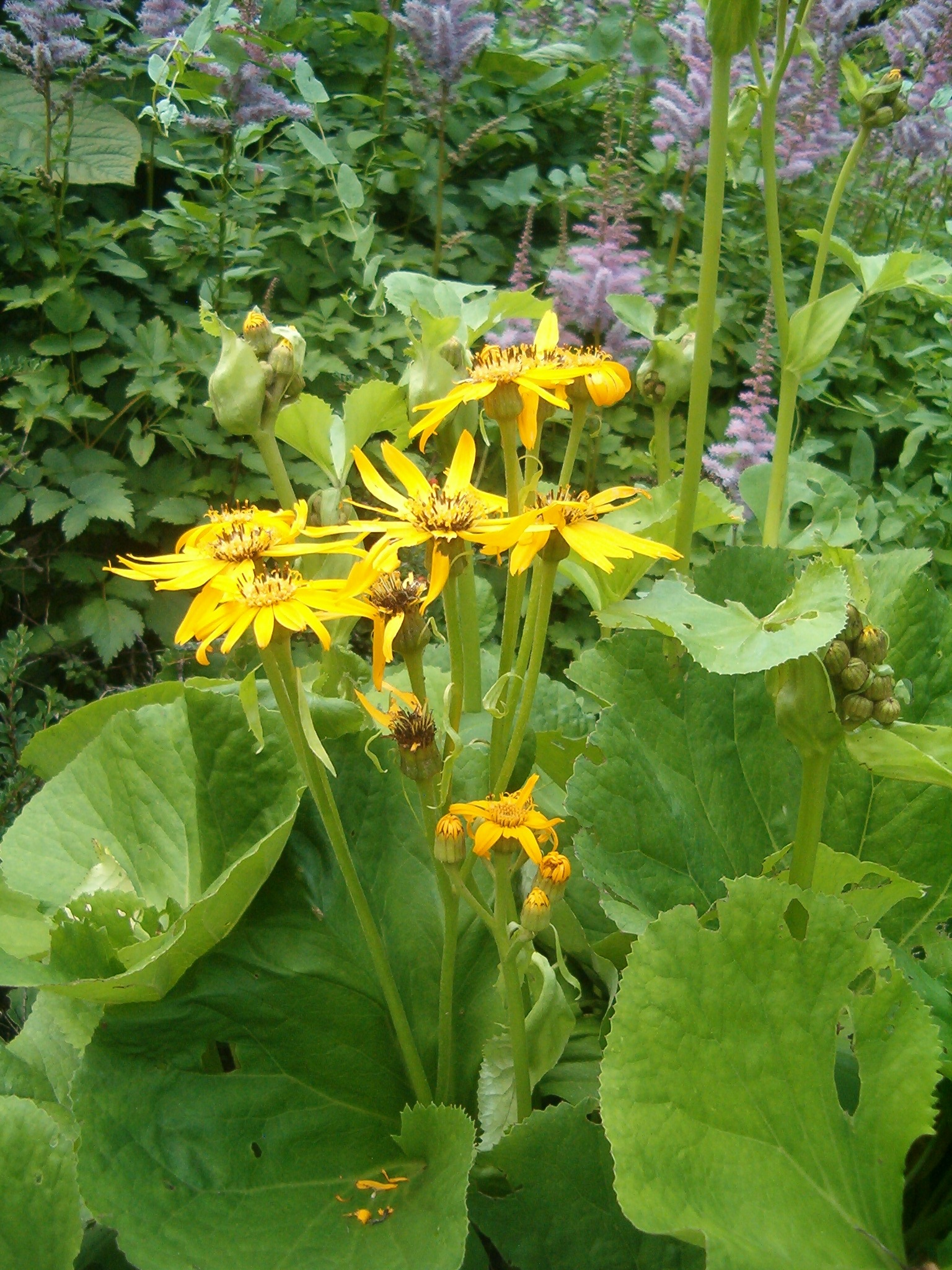 At Botanical Gardens Berlin-Dahlem Species Ligularia alatipes